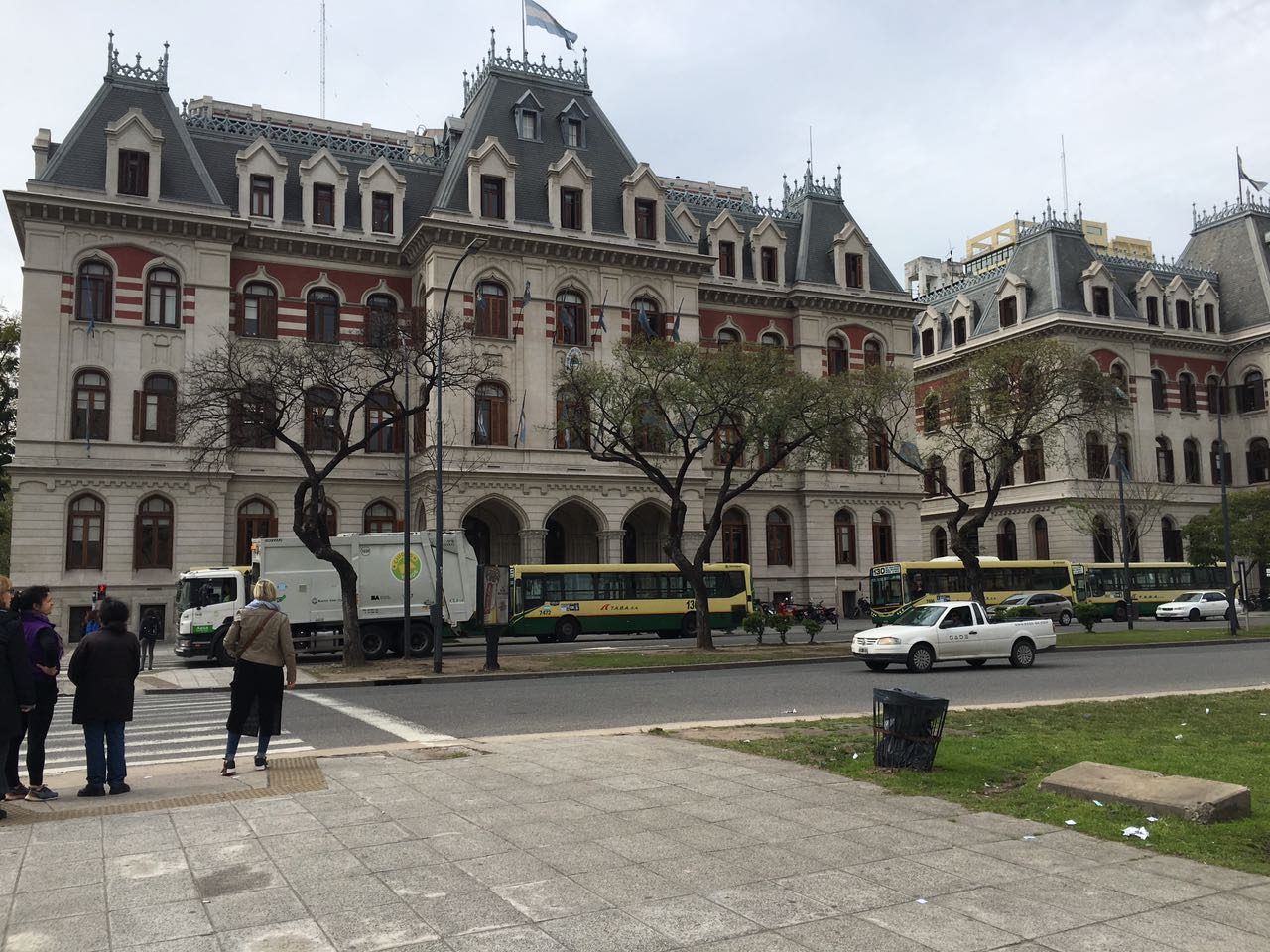 Ministerio de Agroindustria.